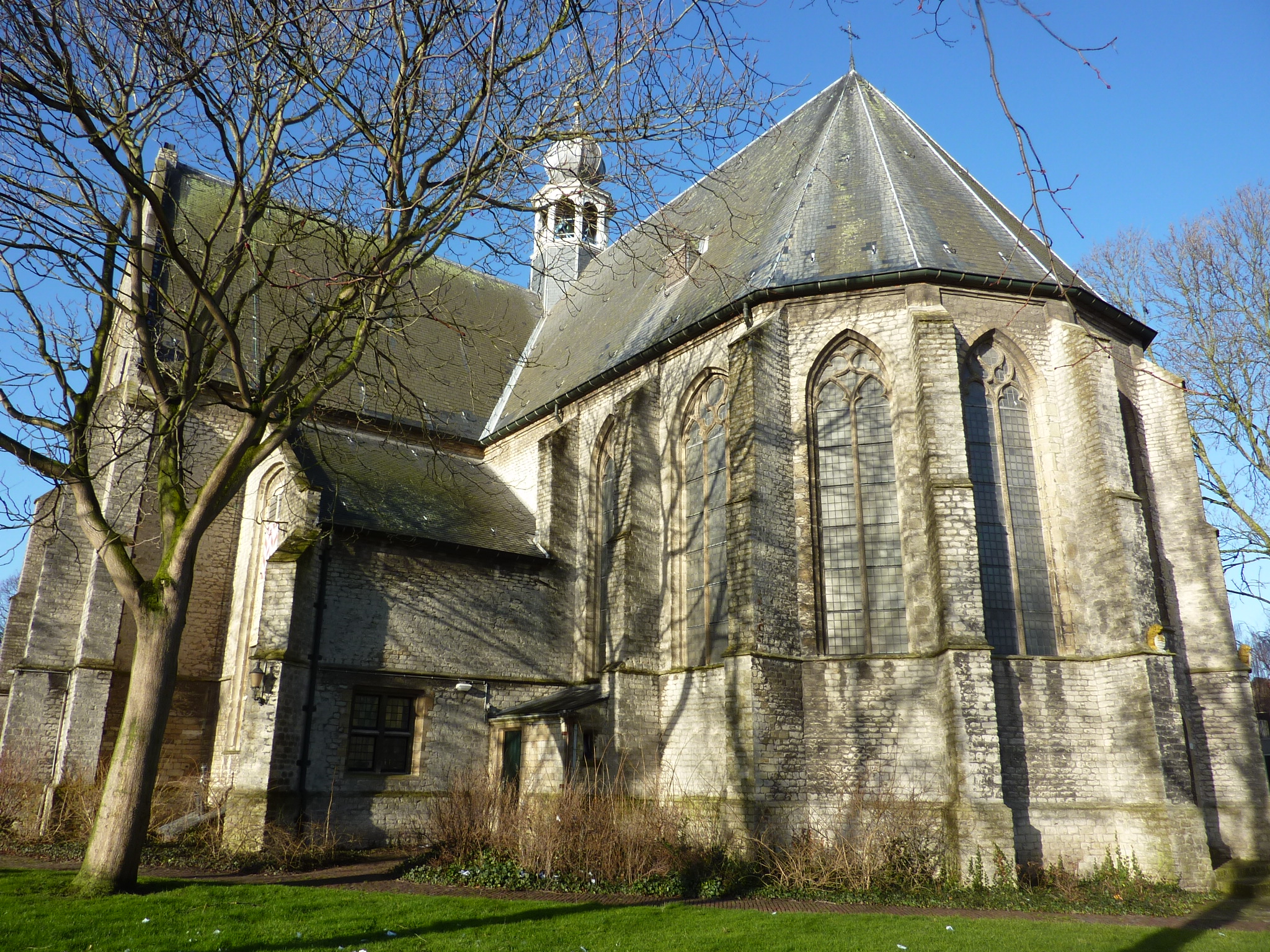 Odulphuskerk (Yerseke)